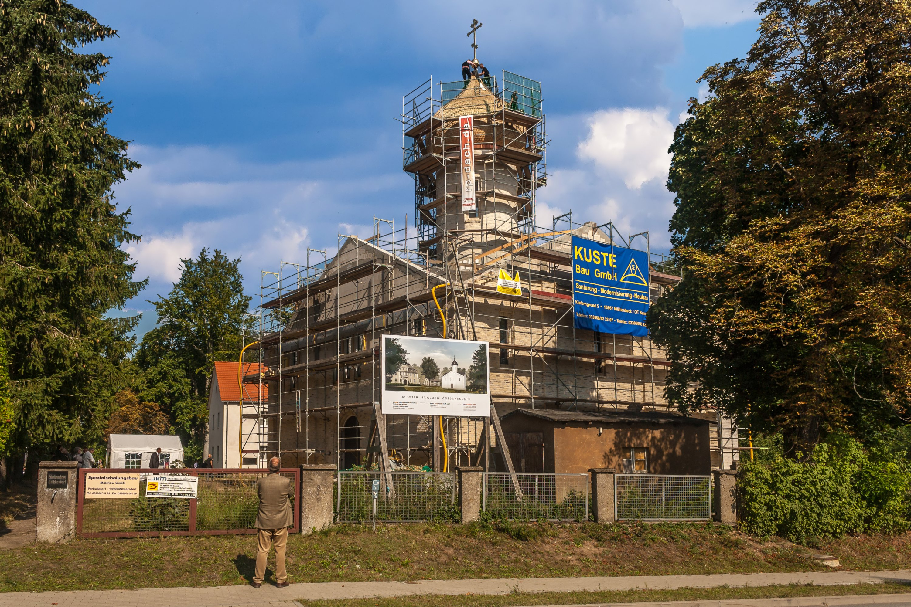 Георгиевский монастырь (Гётшендорф) Сентябрь 2013, Феофан Галинский торжественно открывает золотой крест на куполе.